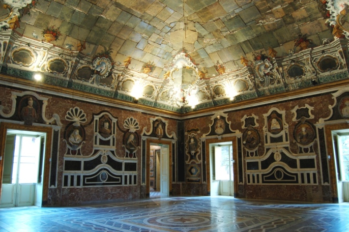 Bagheria (PA), ITA